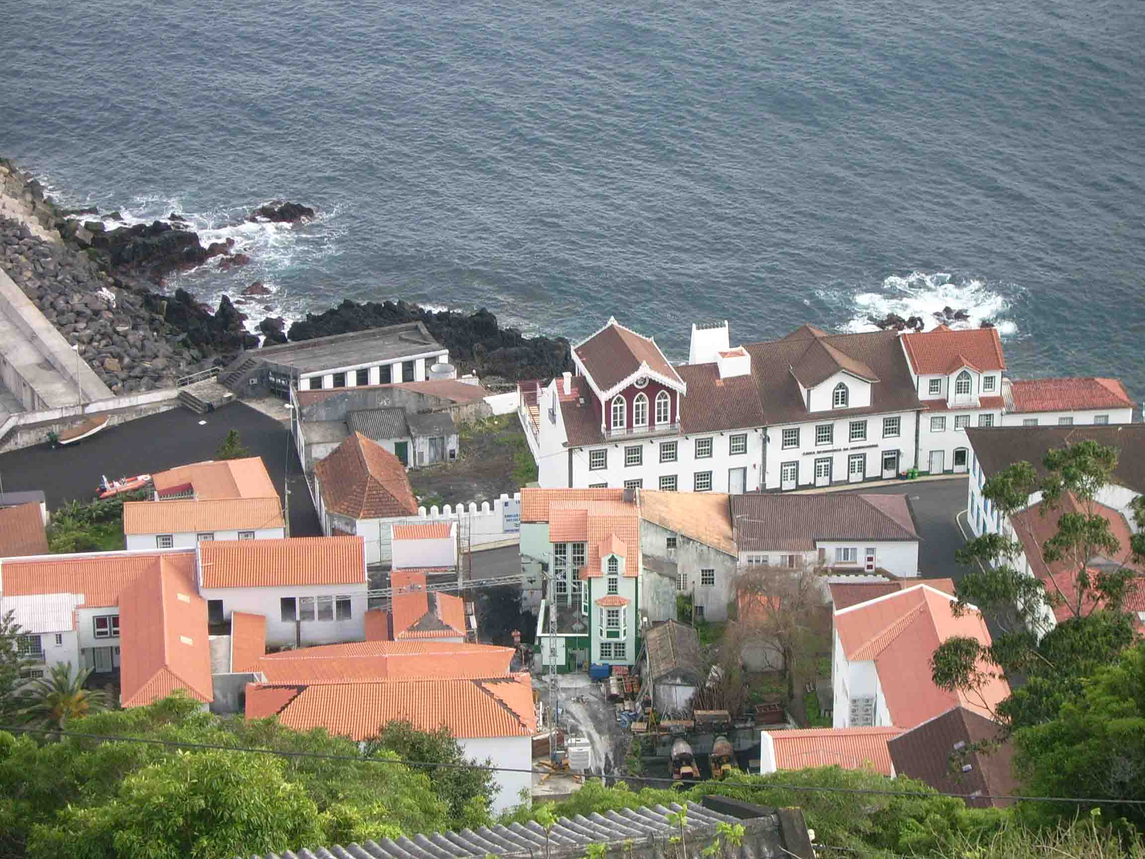 Vista parcial da Vila da Calheta, ilha de São Jorge, Açores, Portugal